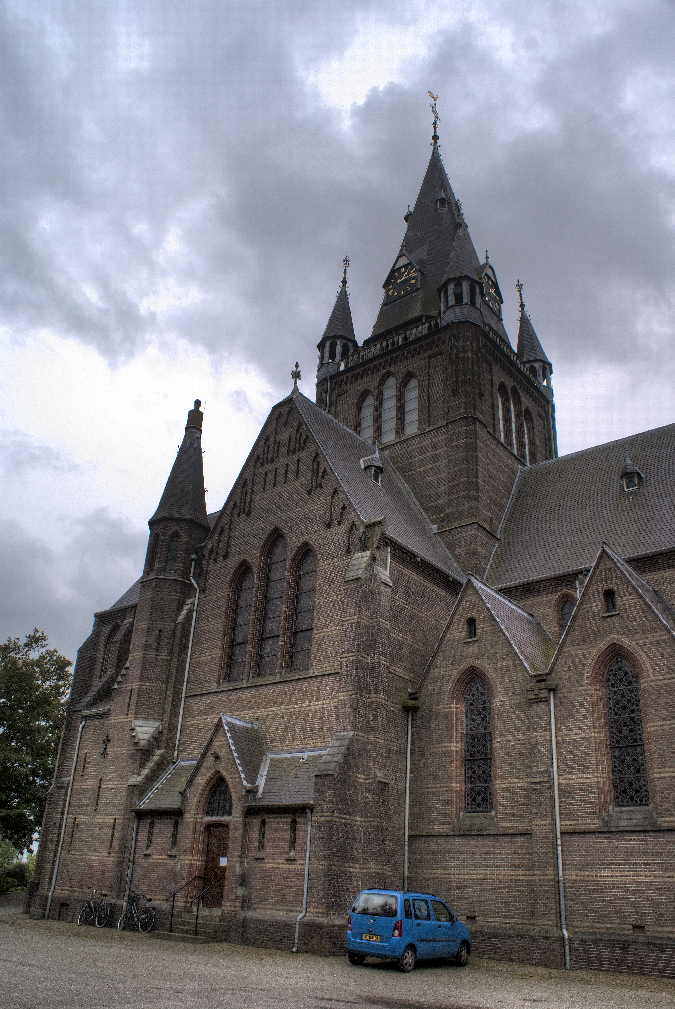 De Sint Urbanuskerk in Nes aan de Amstel. Ontworpen door Joseph Cuypers en gebouwd tussen 1889-1891.